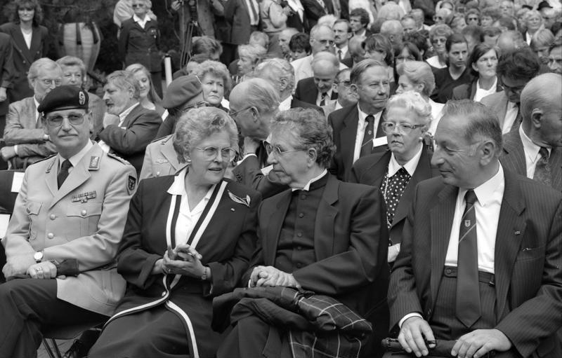 Berlin, 20.7.1991 In der Gedenkstätte Plötzensee fand zum Gedenken an den Widerstand gegen die nationalsozialistische Gewaltherrschaft anläßlich des 47. Jahrestages des 20. Juli 1944 eine Feierstunde statt, an der der Ministerpräsident von Brandenburg, Dr. Manfred Stolpe, die Berliner Bürgermeister Christine Bergmann und Tino Schwierzina, sowie Vertreter der Stiftung "Hilfswerk 20. Juli 1944", des Zentralverbandes Demokratischer Widerstandskämpfer- und Verfolgtenorganisationen und der Union Deutscher Widerstandskämpfer und Verfolgtenverbände teilnahmen.